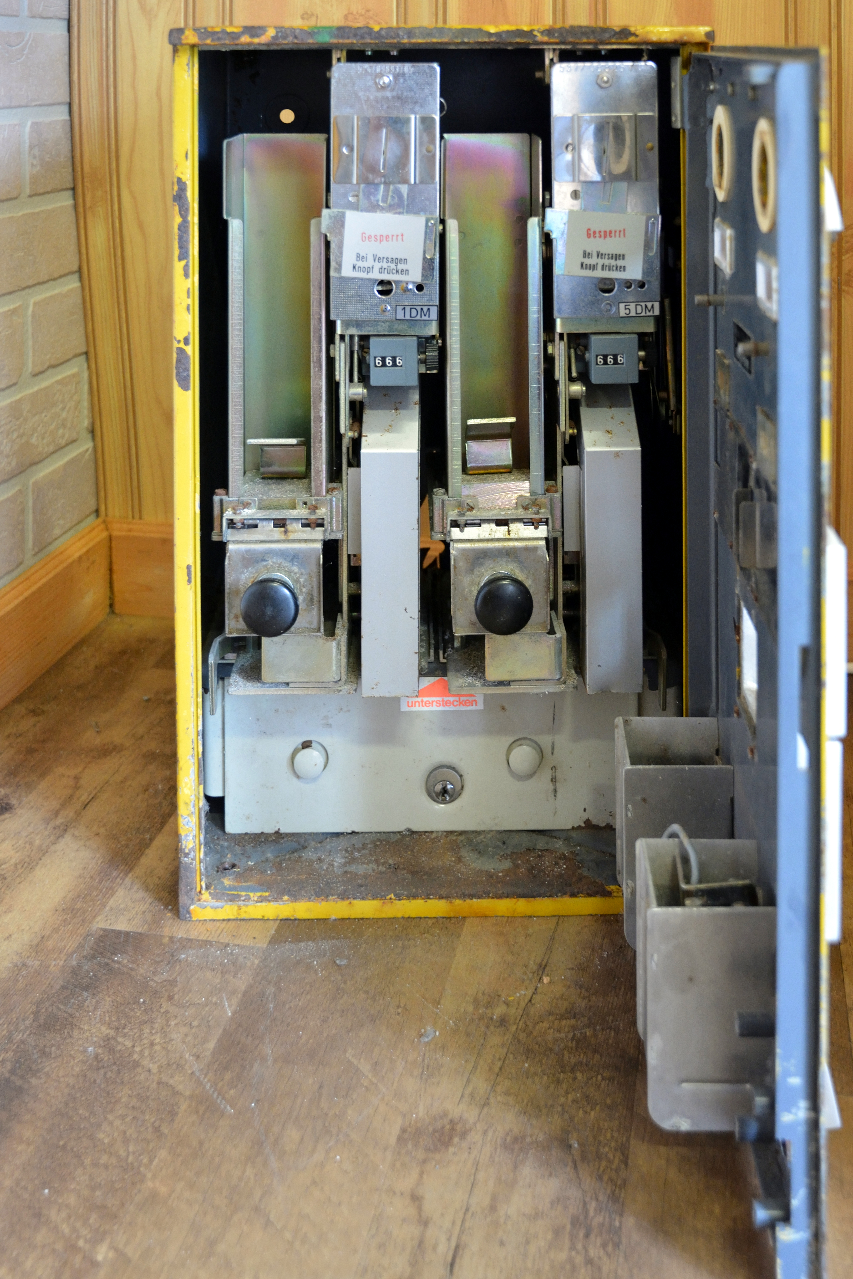 Bilder von Helgoland im Juli 2019Auf dem Museumshof in den nachgebauten Hummerbuden des Museum Helgoland: Das Post-Office, das Philateliemuseum Helgoland: Automat für Markenheftchen